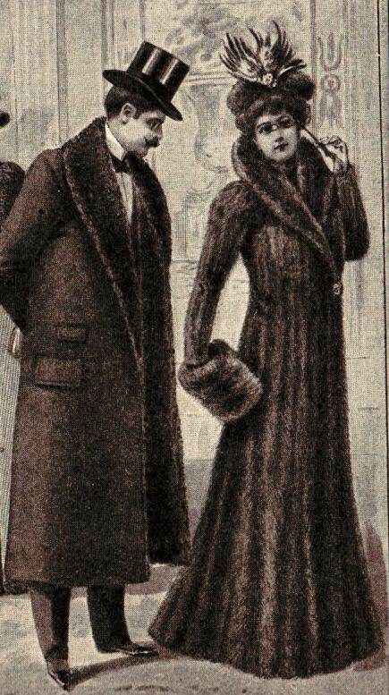 Furrier`s work for the world-fashion 1900 in Paris (cutting) Ausstellungsgruppe des Hauses Revillon Frères, Paris (Ausschnitt). Fig. 7 - Herrenpelz mit Zobelklauenfutter und Seeotterbesatz. Verbrauch: 500 Zobelklauen; 1 Seeotterfell Fig. 8 - Langer Mantel aus Canada Nerz mit Shalkragen aus virginischem Otter. Verbrauch: 164 Nerze; 1 Otter. Arbeitszeit für den Gesellen: 240 Stunden - für die Näherin: 1400 Stunden. Der Körper besteht aus 27 Fellbreiten, die von unten bis oben gehen ohne sichtbare Quernähte, und 5 Fellhöhen. Die Ärmel aus 9 Breiten und 2 Fellhöhen. Alle Felle sind stark ausgelassen und in wirklich tadelloser Weise zusammengesetzt. Vom reintechnischen Standpunkte aus, war dieser Mantel wohl das schönste Stück moderner Kürschnerarbeit der ganzen Ausstellung. Die photographische Reproduktion giebt leider nur ein unvollkommenes Bild dieses Meisterwerks der Kürschnerkunst.